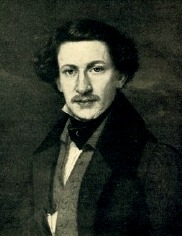 Porträt des Porträtmalers Heinrich Franz Carl Billotte aus Aachen